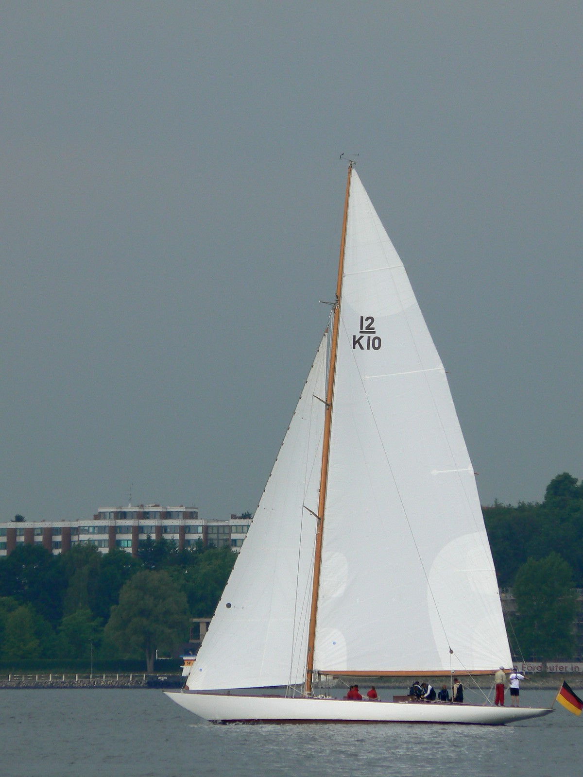 Die 12mR-Yacht TRIVIA auf der Kieler Förde.